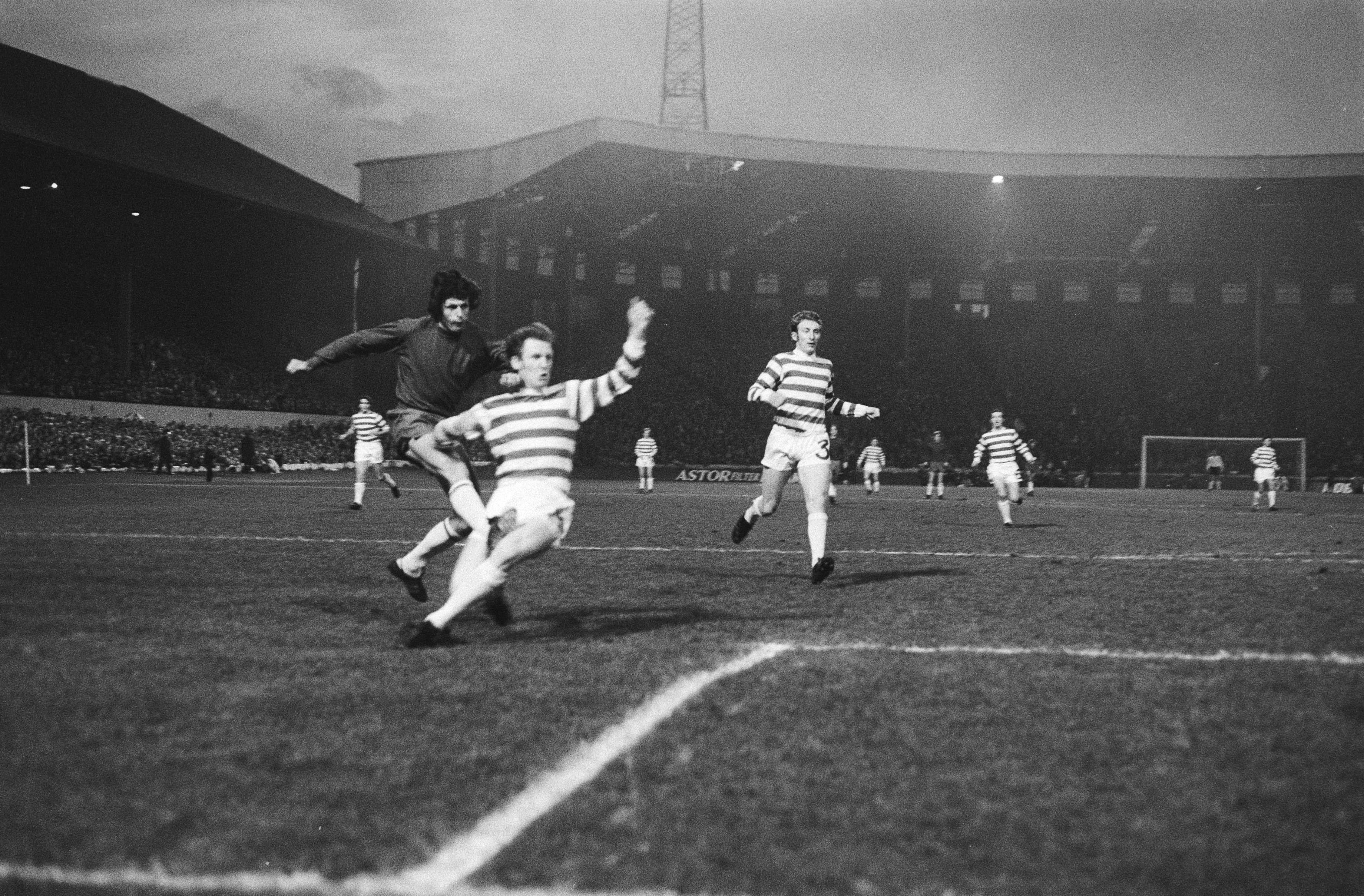 Collectie / Archief : Fotocollectie Anefo Reportage / Serie : Europacup I kwartfinale, voetbalwedstrijd Celtic - Ajax: 2-0 Beschrijving : Spelmoment Datum : 24 maart 1971 Locatie : Glasgow, Groot-Brittannië Trefwoorden : spelers, sport, voetbal Instellingsnaam : AJAX Fotograaf : Fotograaf Onbekend / Anefo Auteursrechthebbende : Nationaal Archief Materiaalsoort : Negatief (zwart/wit) Nummer archiefinventaris : bekijk toegang 2.24.01.05 Bestanddeelnummer : 924-3909